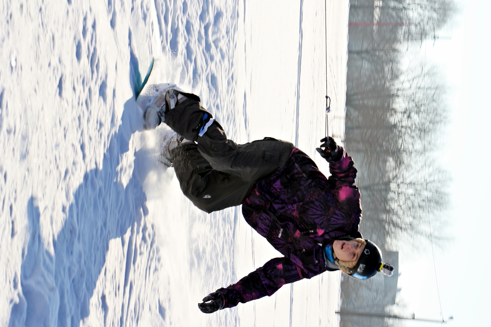 Lumelaudur Tartu Anne kanali peale enne hüppetamine. Korraldaja - triatloni klub Trismile.